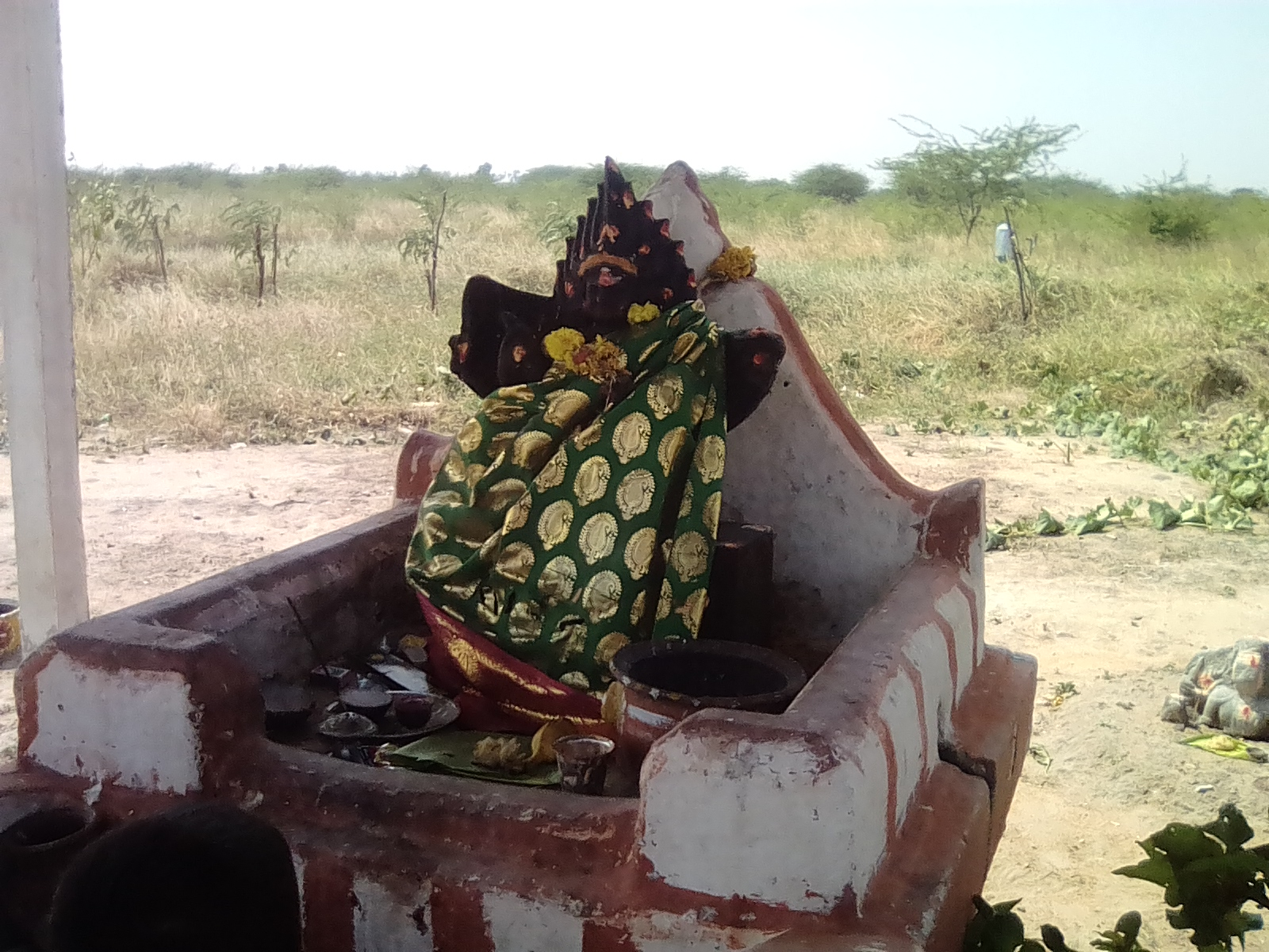 ஒமாட்சி காளியம்மன் திரு உருவசிலை